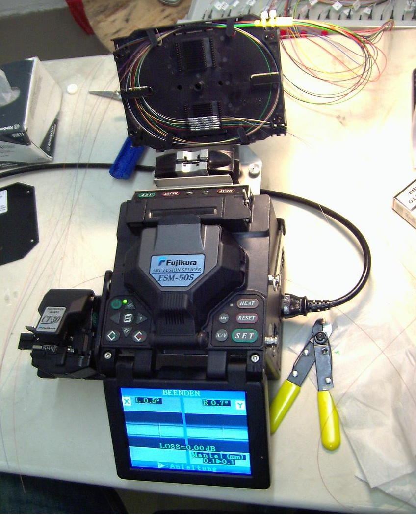 Bild zeigt das LWL / Glasfaser spleissen per Thermischen Fusionsspleiss der CITYNETZ GmbH mit Gerät von Fujikura .